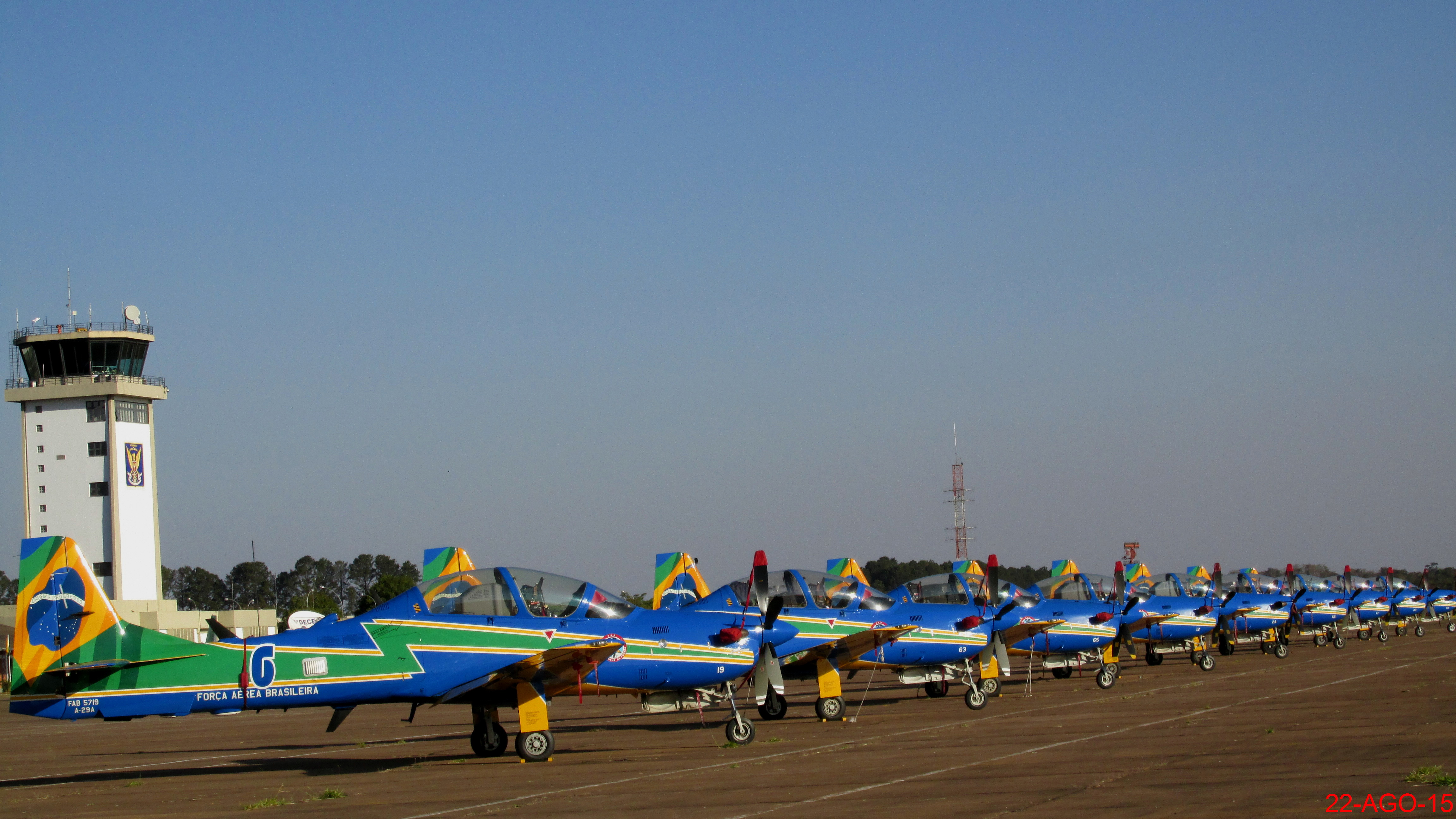 Aviões Embraer A-29 Super Tucano da Esquadrilha da Fumaça na Academia da Força Aérea em Pirassununga/SP. Em 31 de março de 2013, os antigos e históricos aviões Tucanos T-27 fizeram o último voo pela Fumaça em Brasília. O Esquadrão de Demonstração Aérea (EDA), popularmente conhecido como Esquadrilha da Fumaça, realizou na manhã de 3 de julho de 2015 a primeira apresentação após a substituição da aeronave T-27 Tucano pelo A-29 Super Tucano. A demonstração aconteceu durante a cerimônia de entrega de espadim aos cadetes do primeiro ano da Academia da Força Aérea (AFA). A primeira apresentação do Super Tucano em um Domingo Aéreo foi em 23 de agosto de 2015. O retorno da Fumaça reuniu mais de 93.000 pessoas e milhares de pessoas não conseguiram chegar a AFA devido ao enorme congestionamento. A Esquadrilha da Fumaça realizou duas apresentações neste dia, uma de manhã e outra a tarde. A "Nova Fumaça" é liderada pelo Coronel Aviador Marcelo Gobett Cardoso.